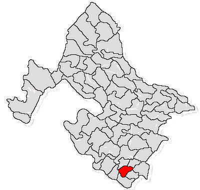 Categorie:Hărţi ale judeţului Mehedinţi